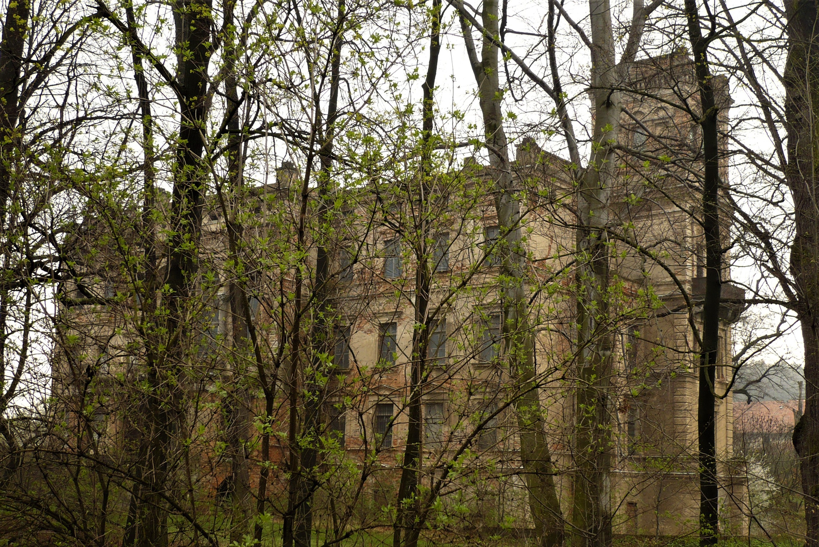 Pałac w Mrowinach